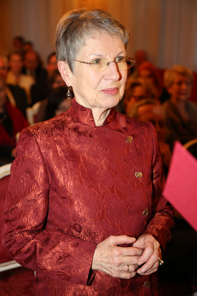 Barbara Frischmuth-2870